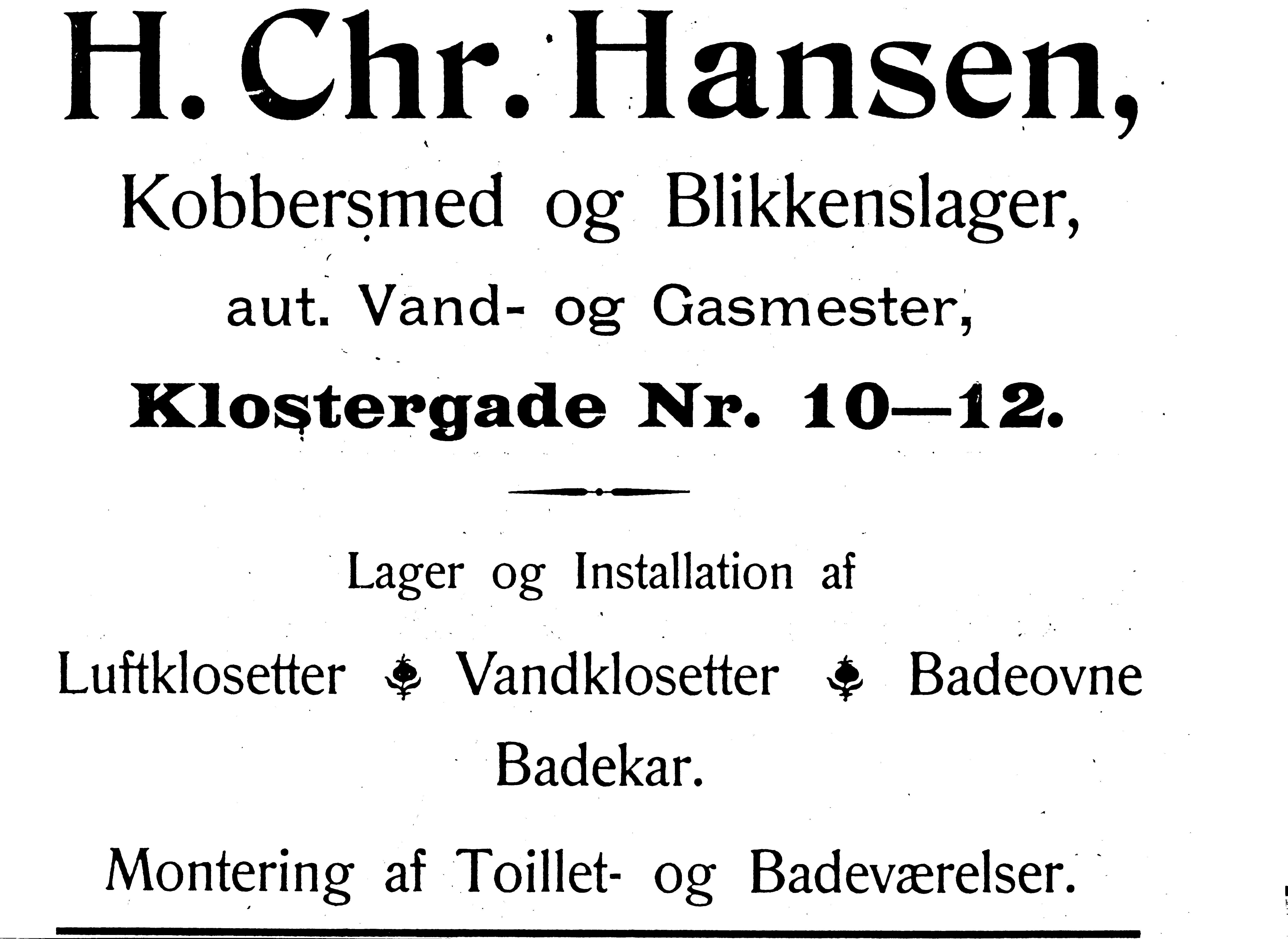 Annonce af H. Chr. Hansen, ejer af Hjernø, indsat i Aarhus Vejviseren 1900.